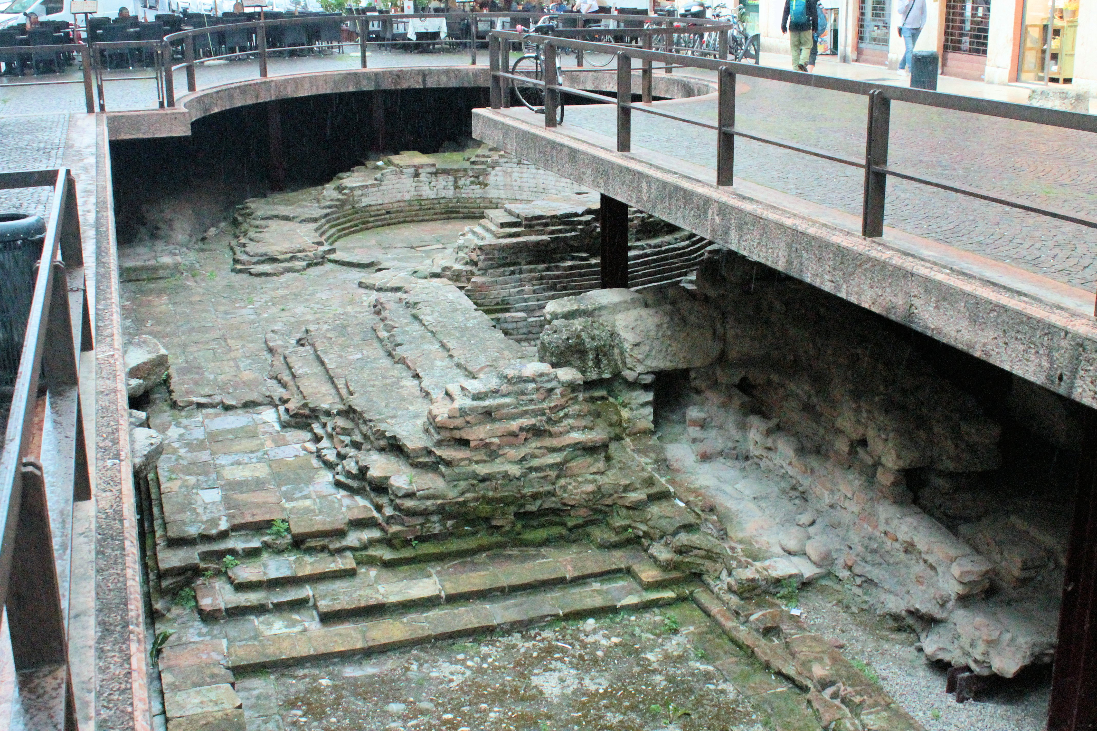 Mappatura dei luoghi durante evento Public archaeology Verona, 18-19 maggio 2017